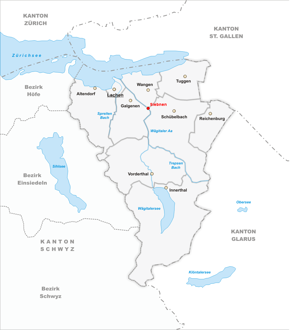 Lage der Ortschaft Siebnen in der March